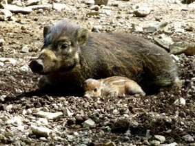 Femelle sanglier et son petit